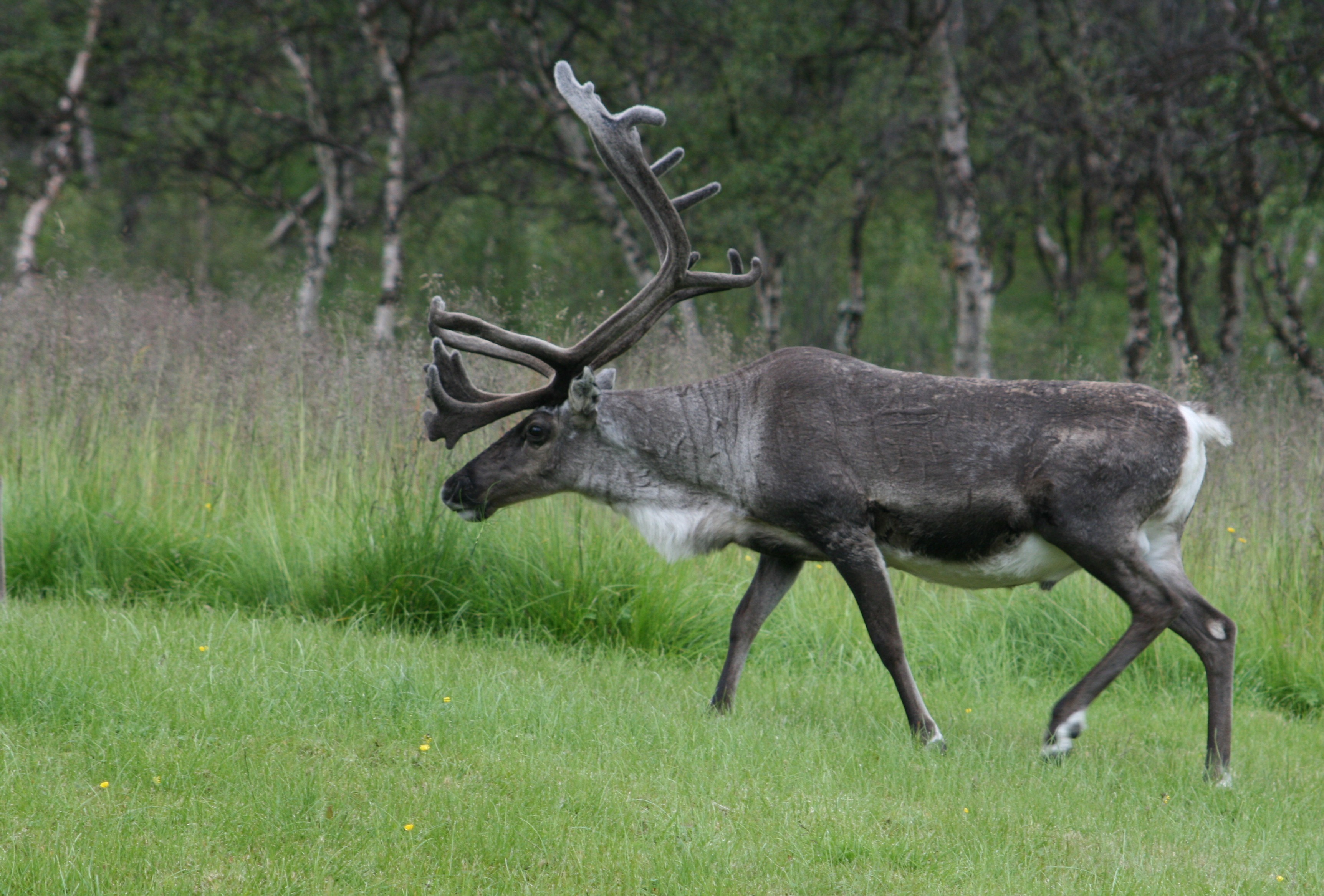 Reinbukken på frisk grønt beite.